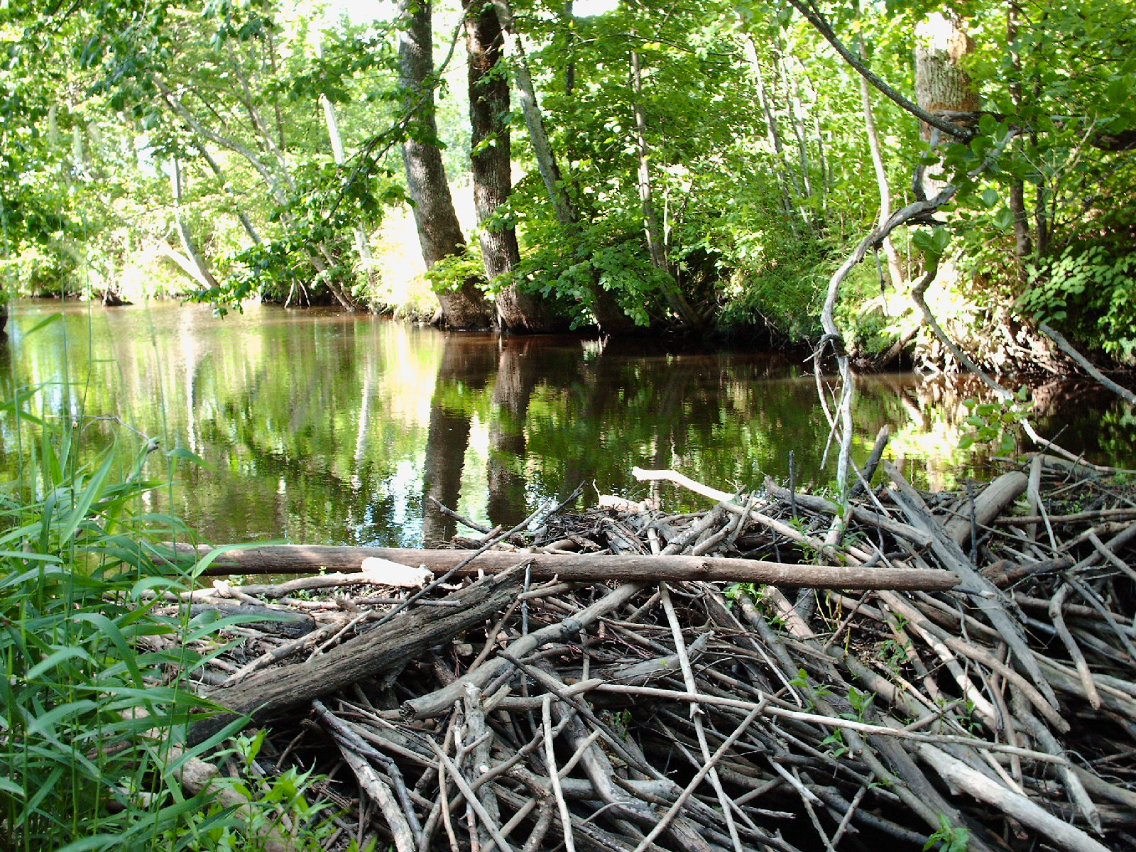 Žvelsa. 2006.07.15 asmenine foto